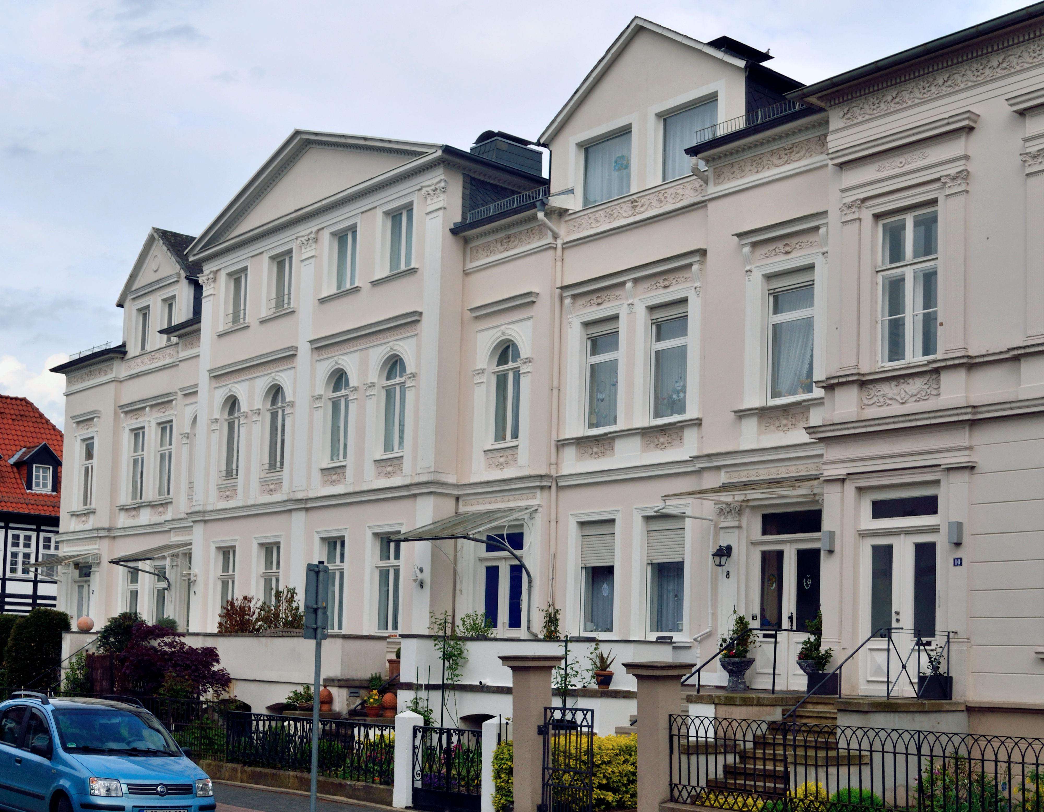 Reihenwohnhaus This is a photograph of an architectural monument.